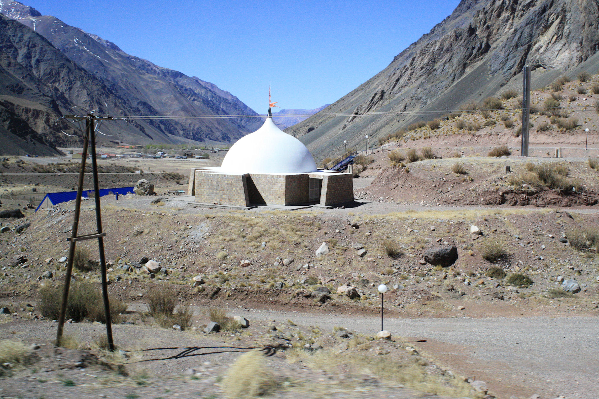 Parque Punta de Vacas, Argentina.